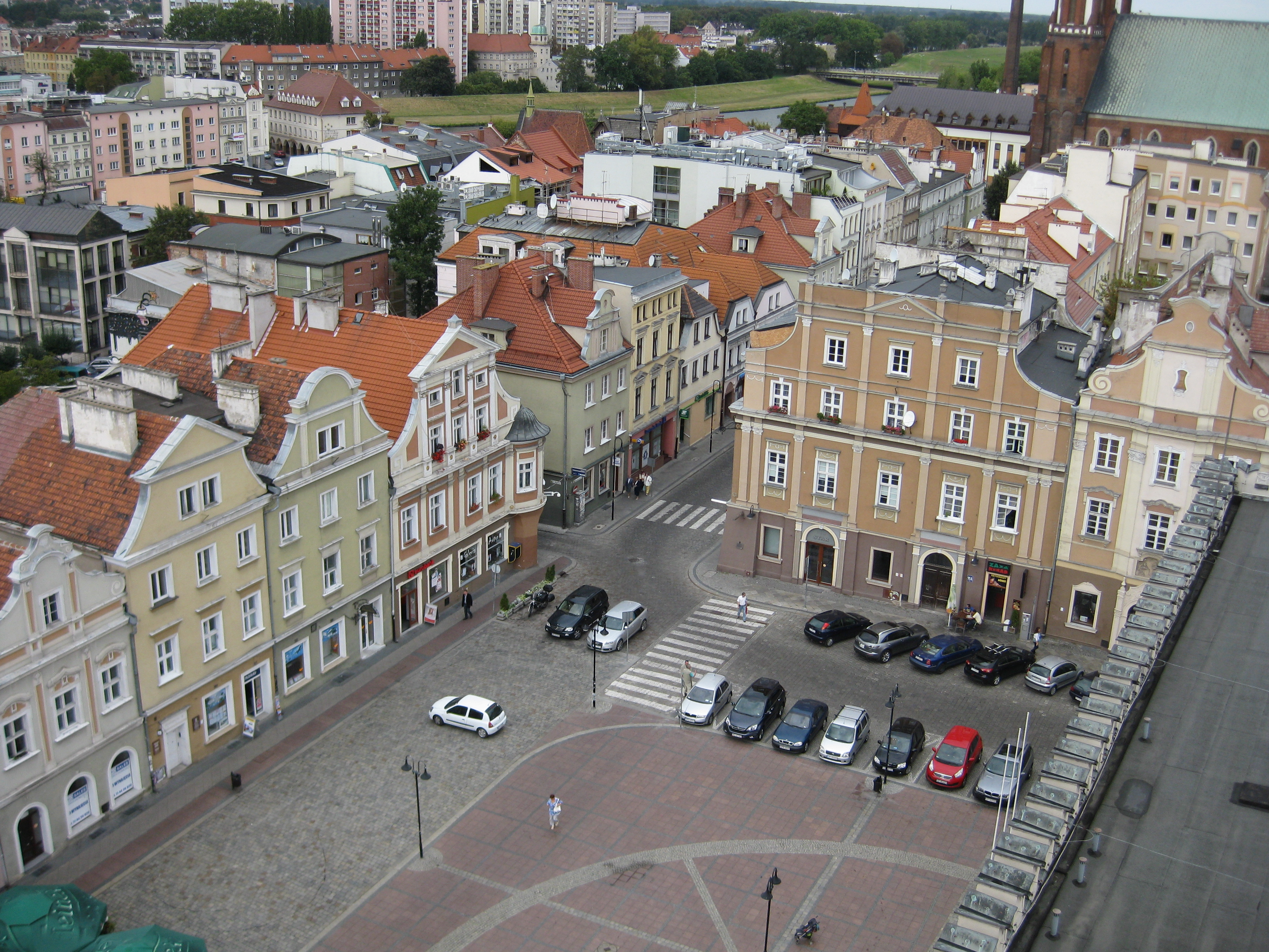 Ring Nordwest von oben